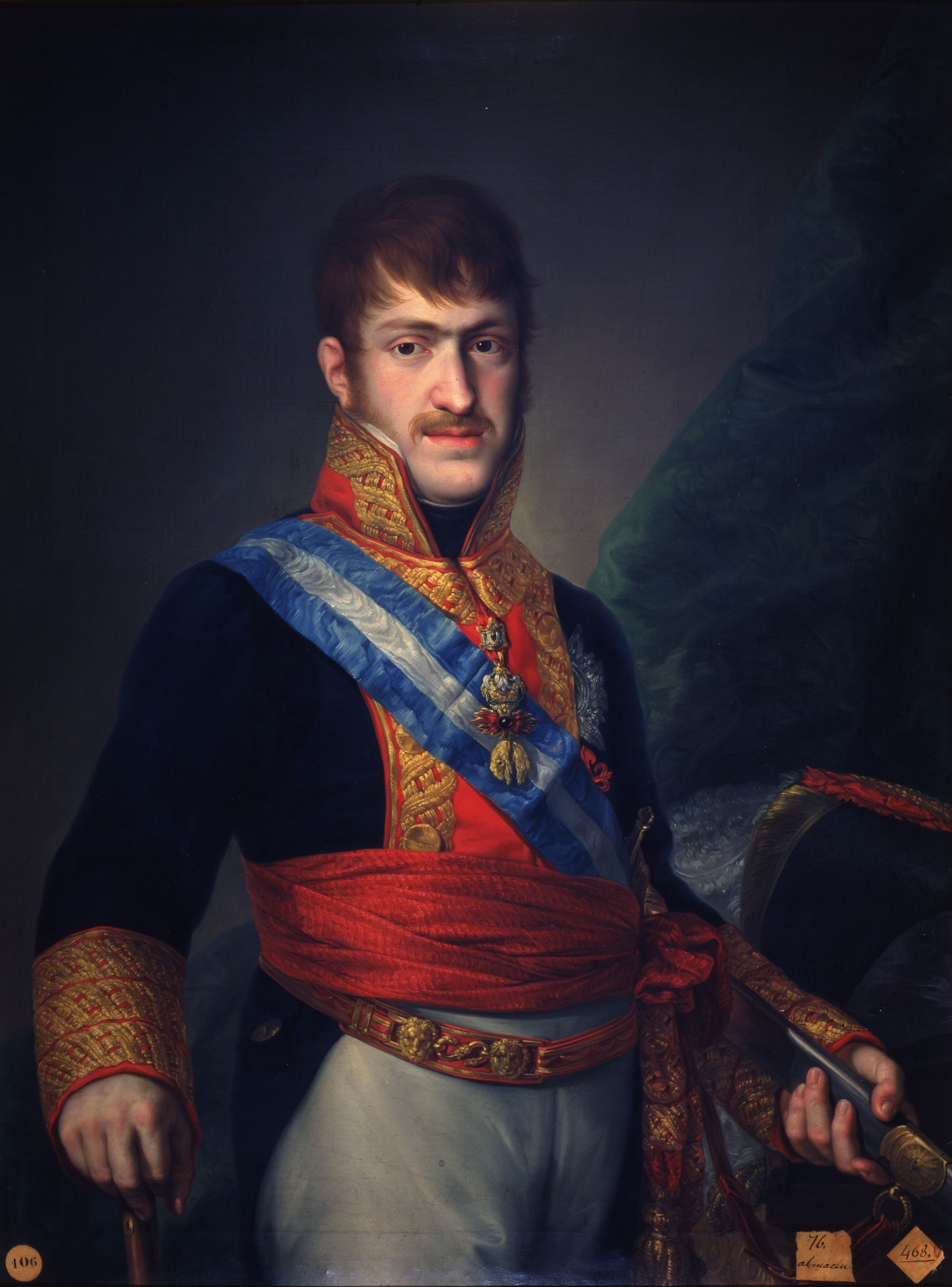 Retrato del infante Carlos María Isidro de Borbón (1788-1855), con uniforme de capitán general y portando varias condecoraciones. Era hijo del rey Carlos IV de España y hermano de Fernando VII.